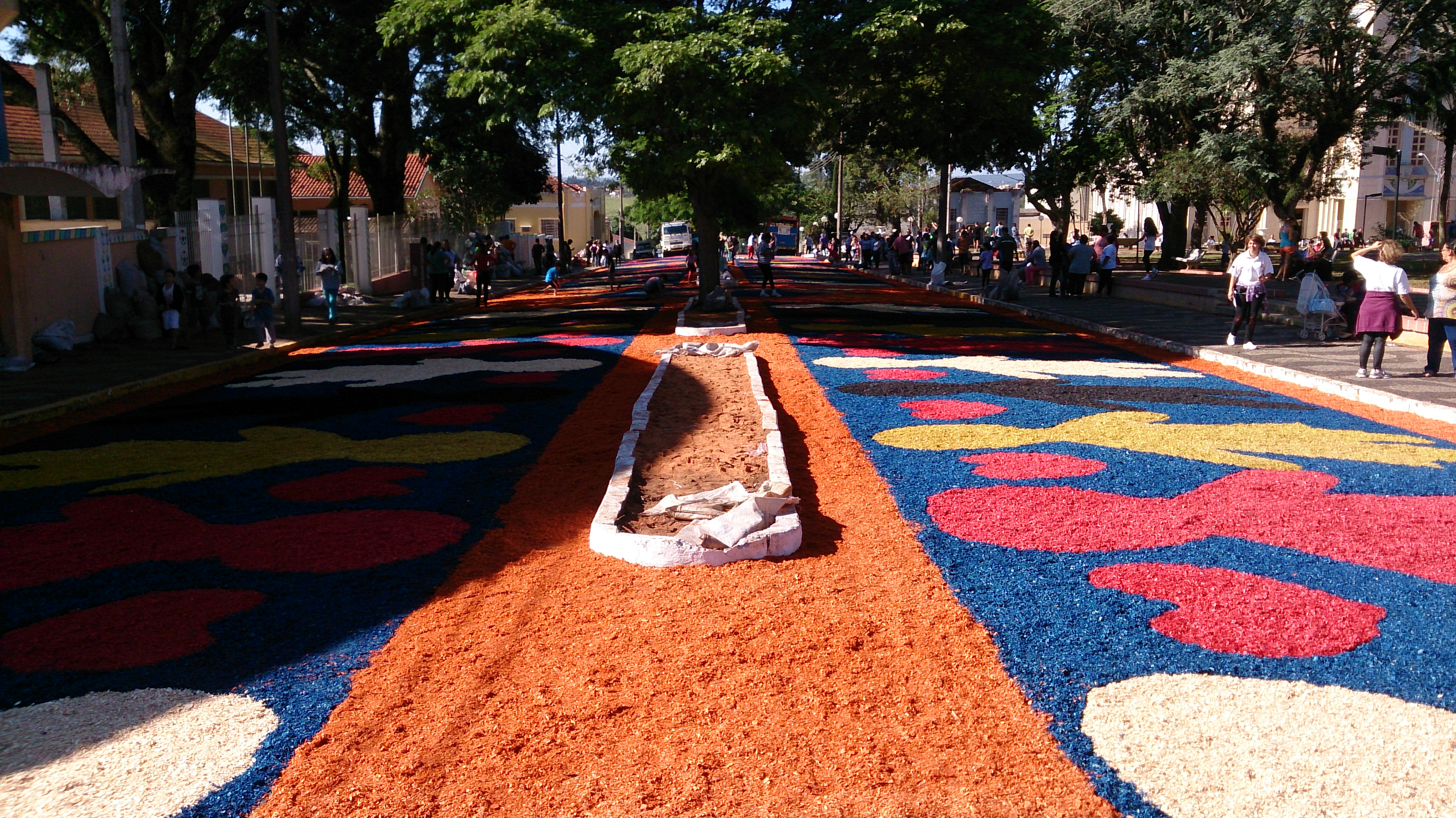 Tapetes de Corpus Christi Vera Cruz SP